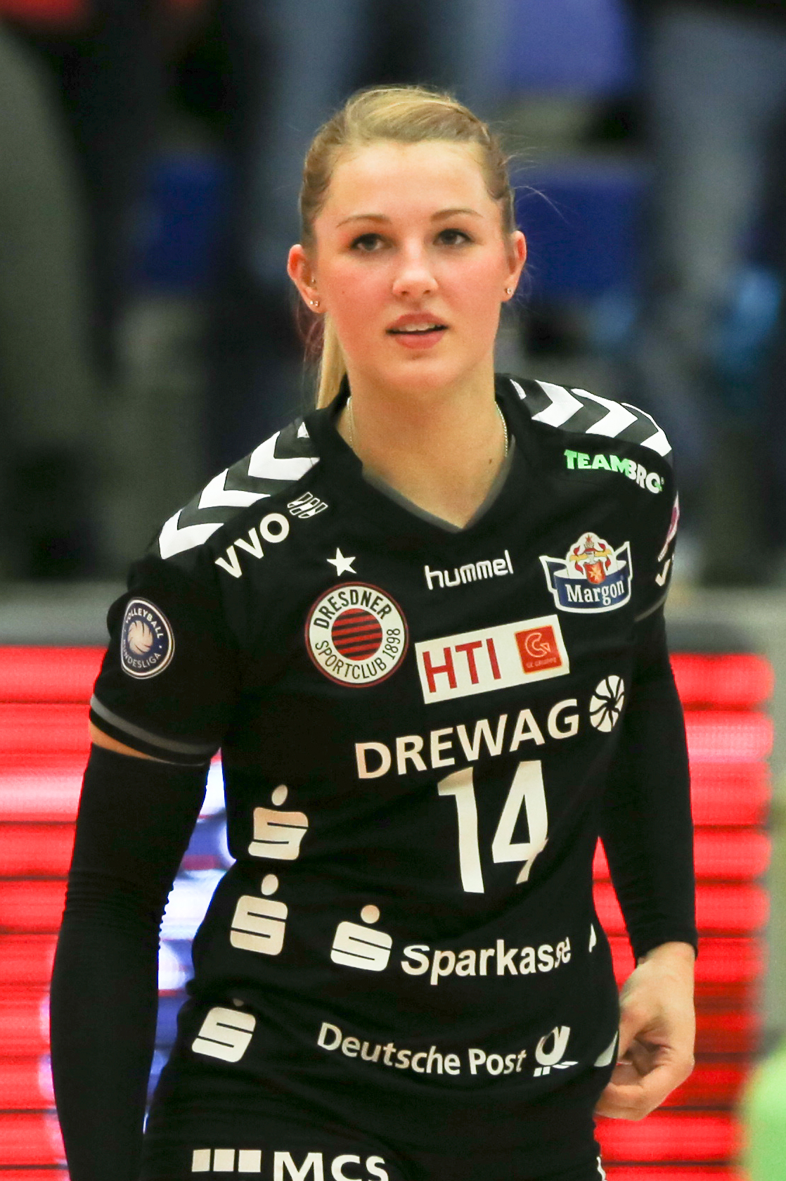 Volleyballspiel in der 1. Bundesliga des Dresdner SC gegen Aurubis Hamburg in der Margon Arena in Dresden.